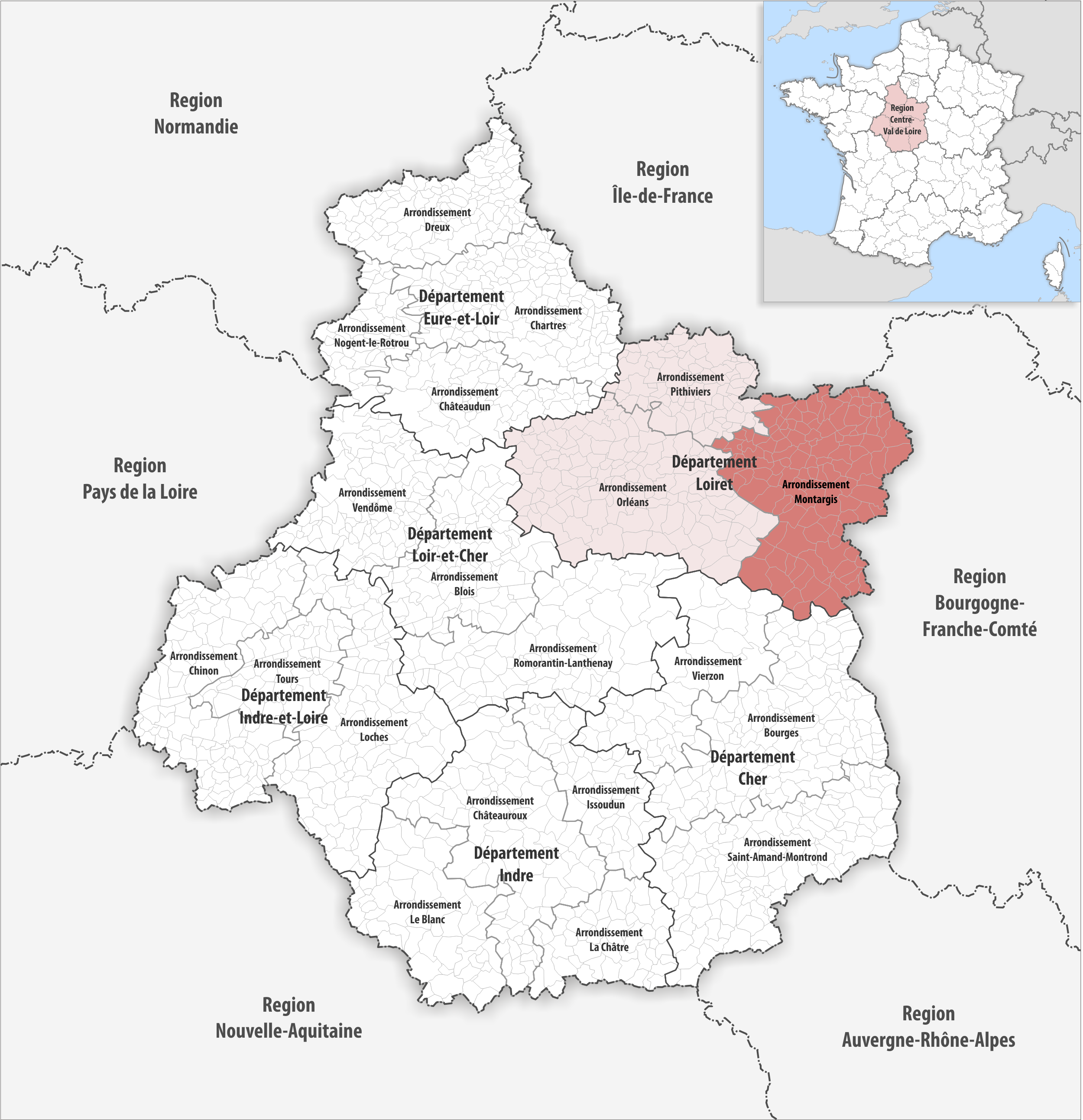 Lage des Arrondissements Montargis